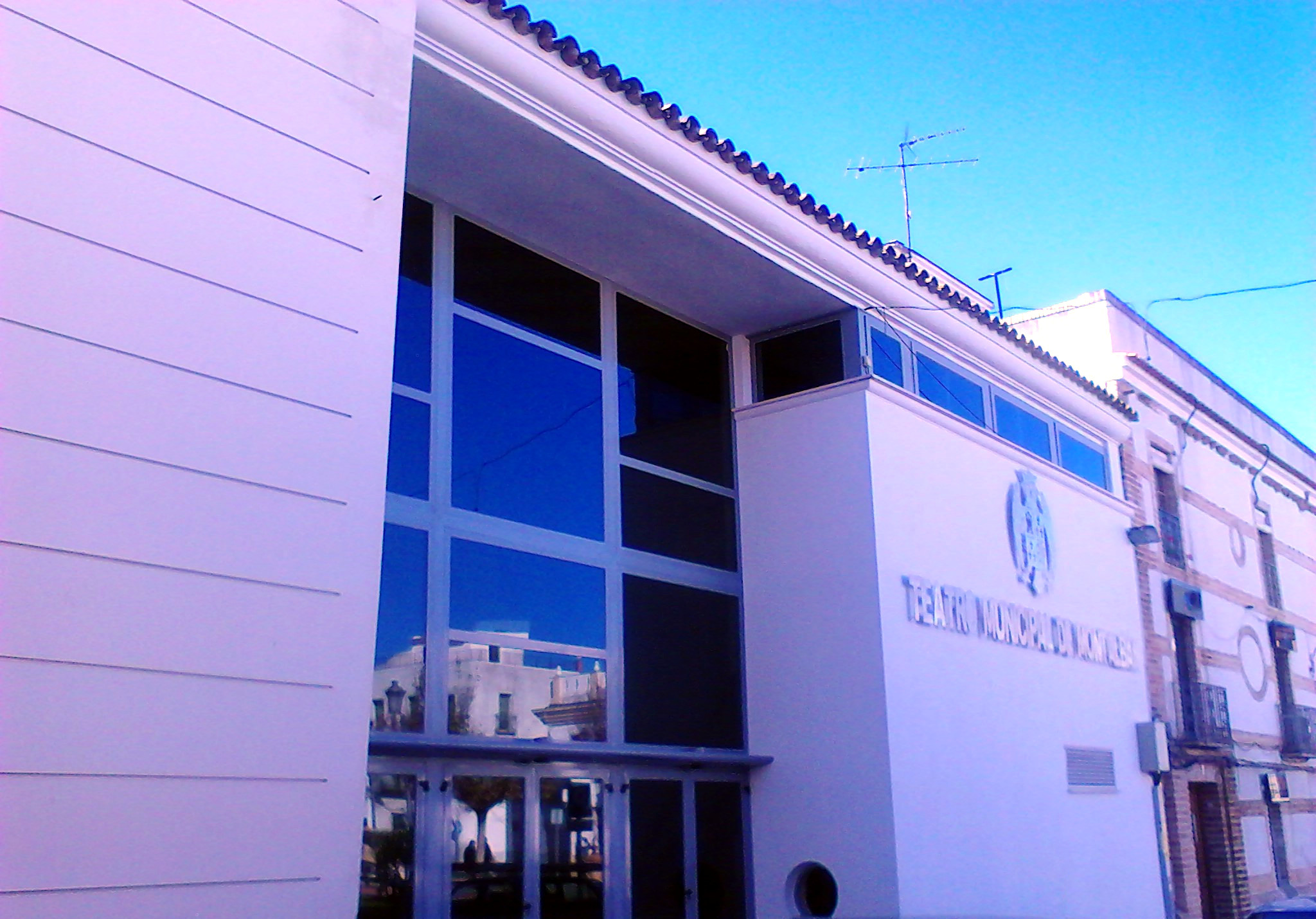 Teatro Municipal de Montalbán de Córdoba (España).